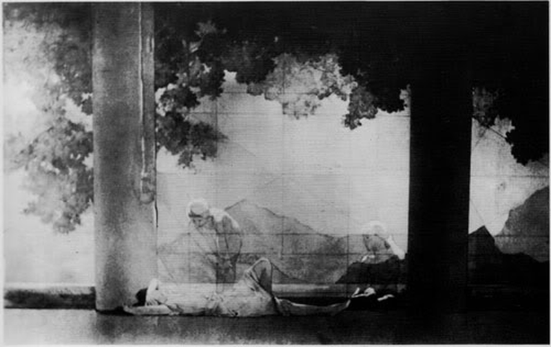 Maxfield Parrish (1870—1966). Daybreak study. 1922